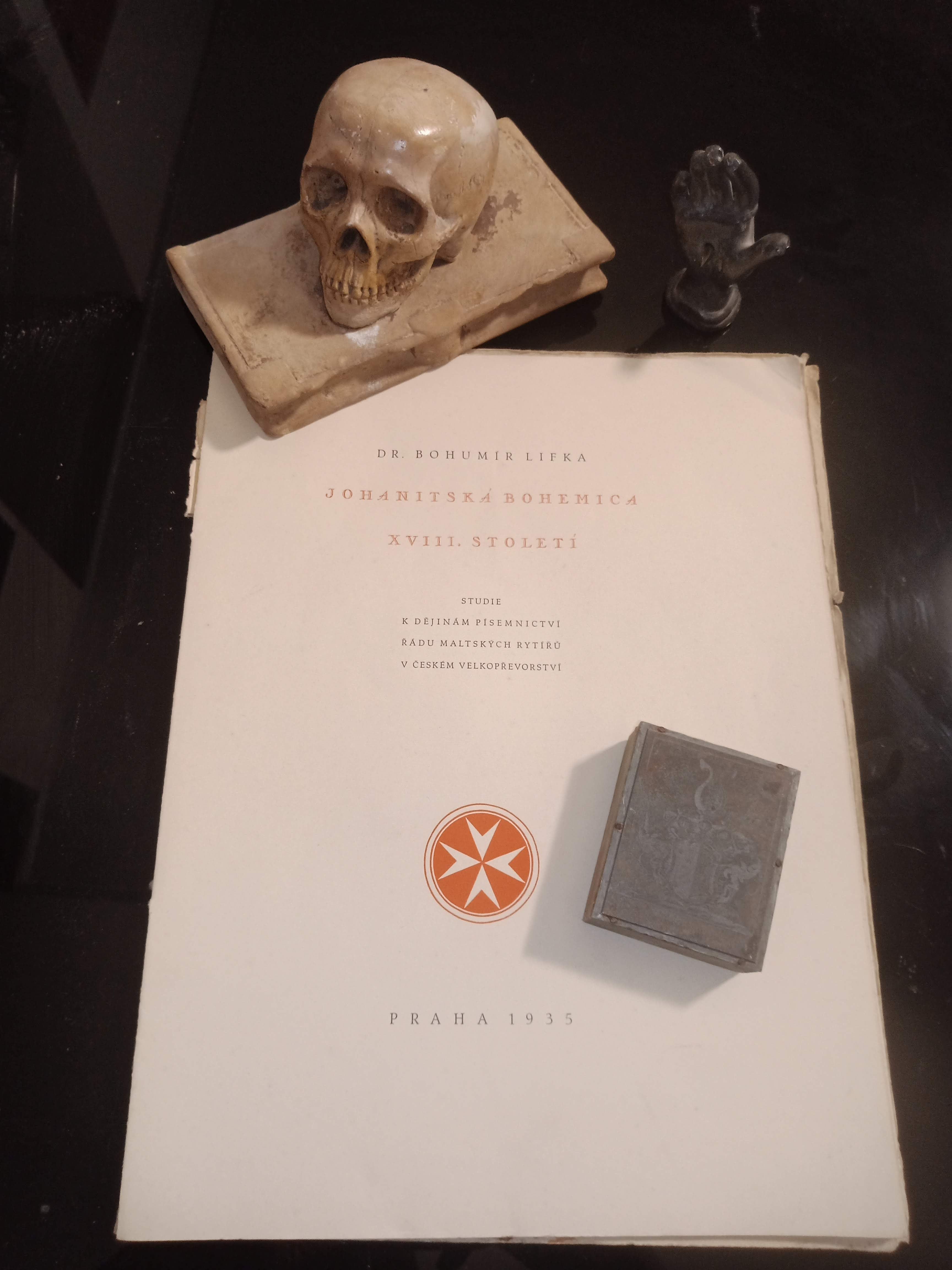 Lifka's book and items.